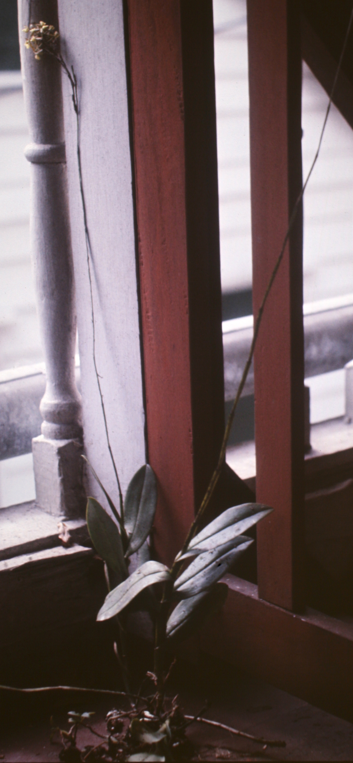 Epidendrum anceps , Suriname.